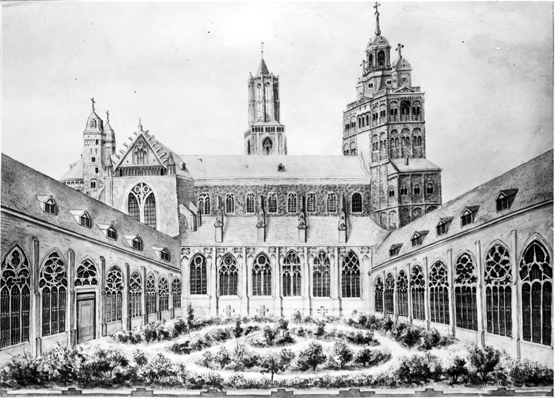 Kruisgang en pandhof van de Sint-Servaaskerk: naar tekening van Ph. van Gulpen in collectie Van der Noordaa.